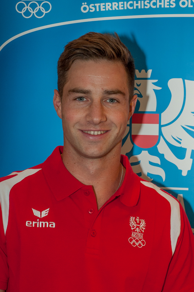 Einkleidung der Österreichischen Teilnehmer an den Olympischen Sommerspielen 2016 am 16./17. Juli 2016 in Wien. Bild zeigt Constantin Blaha.